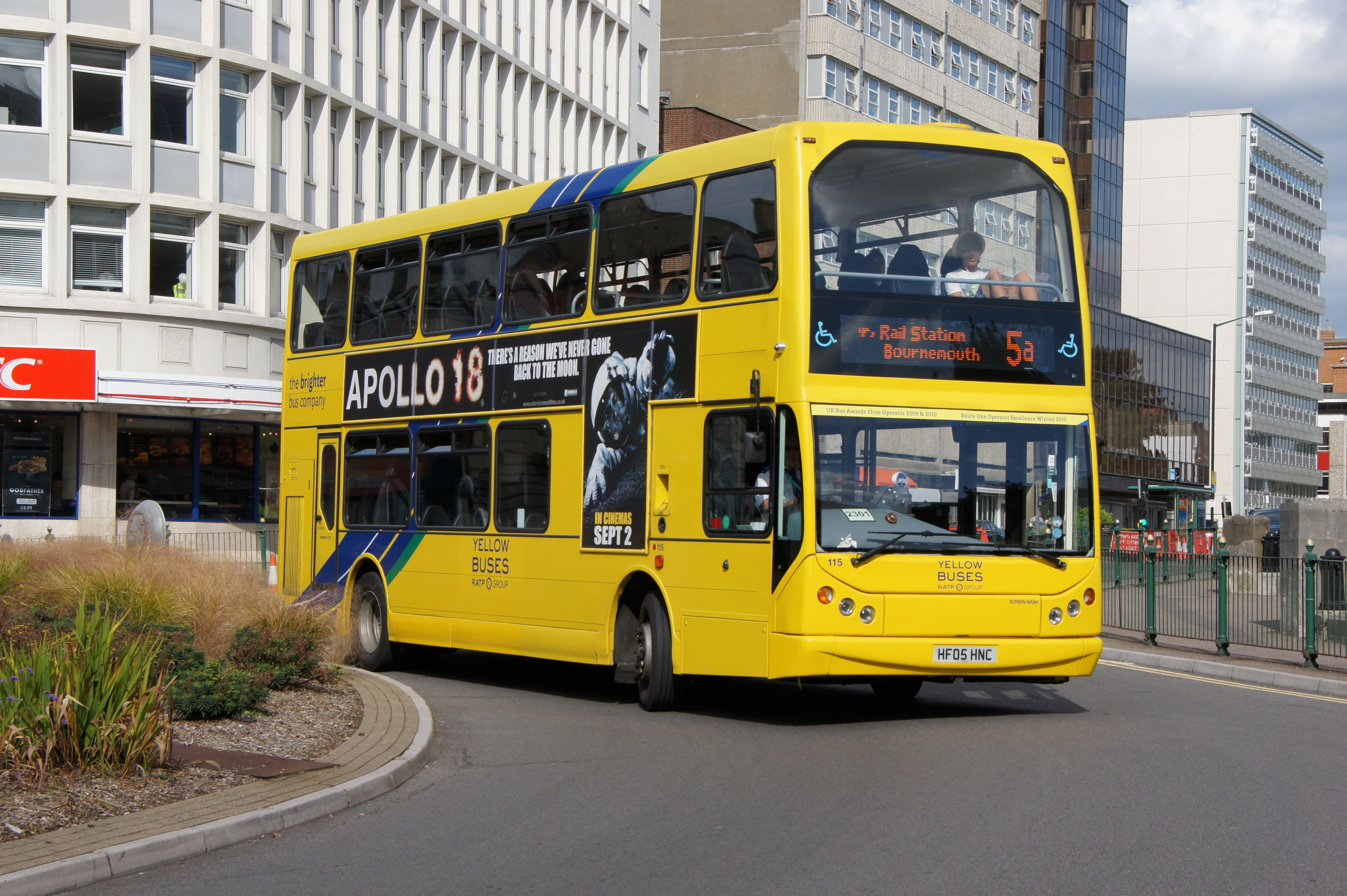 HF05HNC-1 290811 CPS